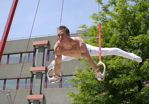 Yuri van Gelder in 2008